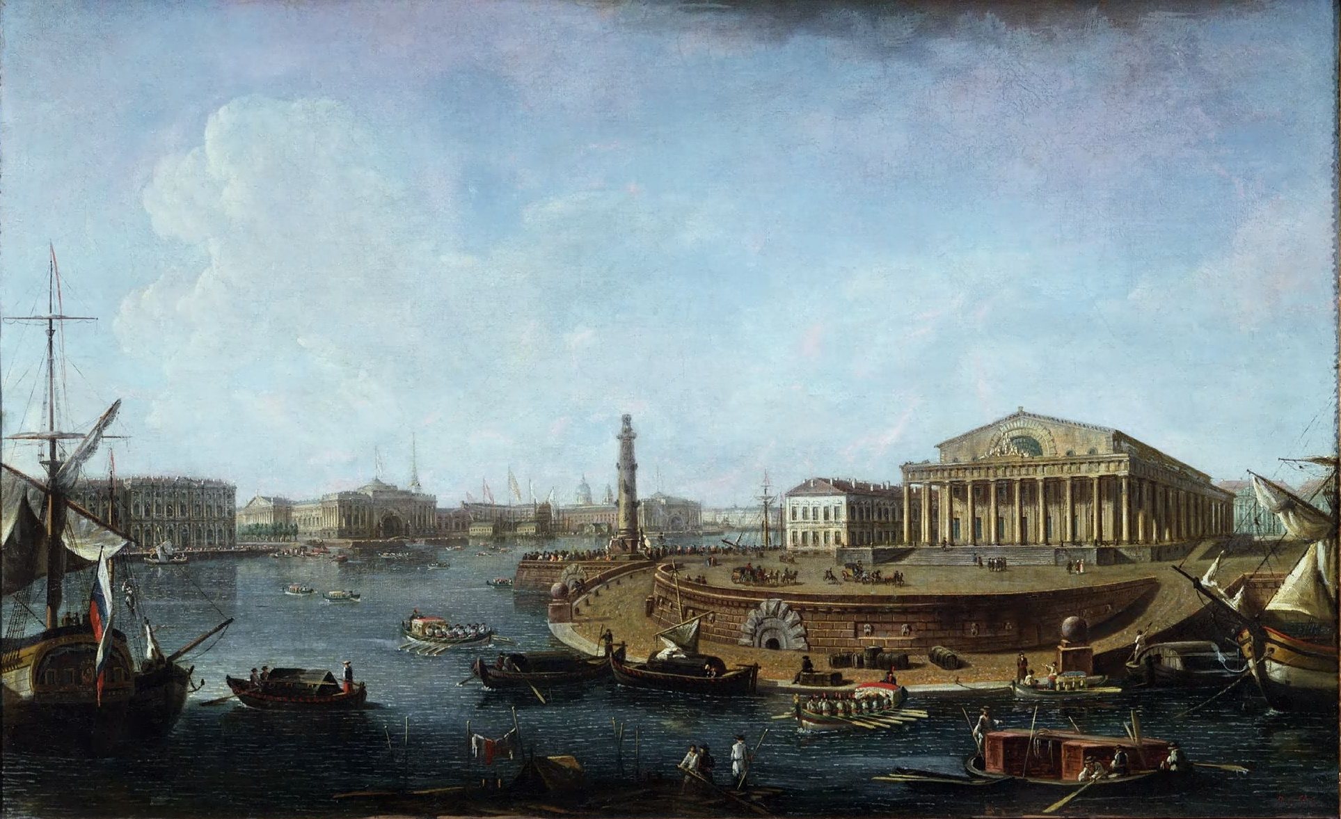 Вид на Биржу и Адмиралтейство от Петропавловской крепости. Государственная Третьяковская галерея.